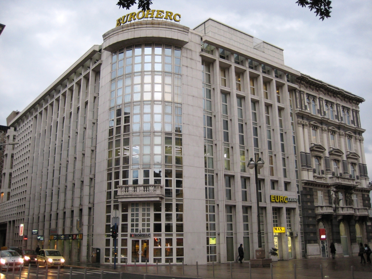 Zgrada Euroherca u Rijeci